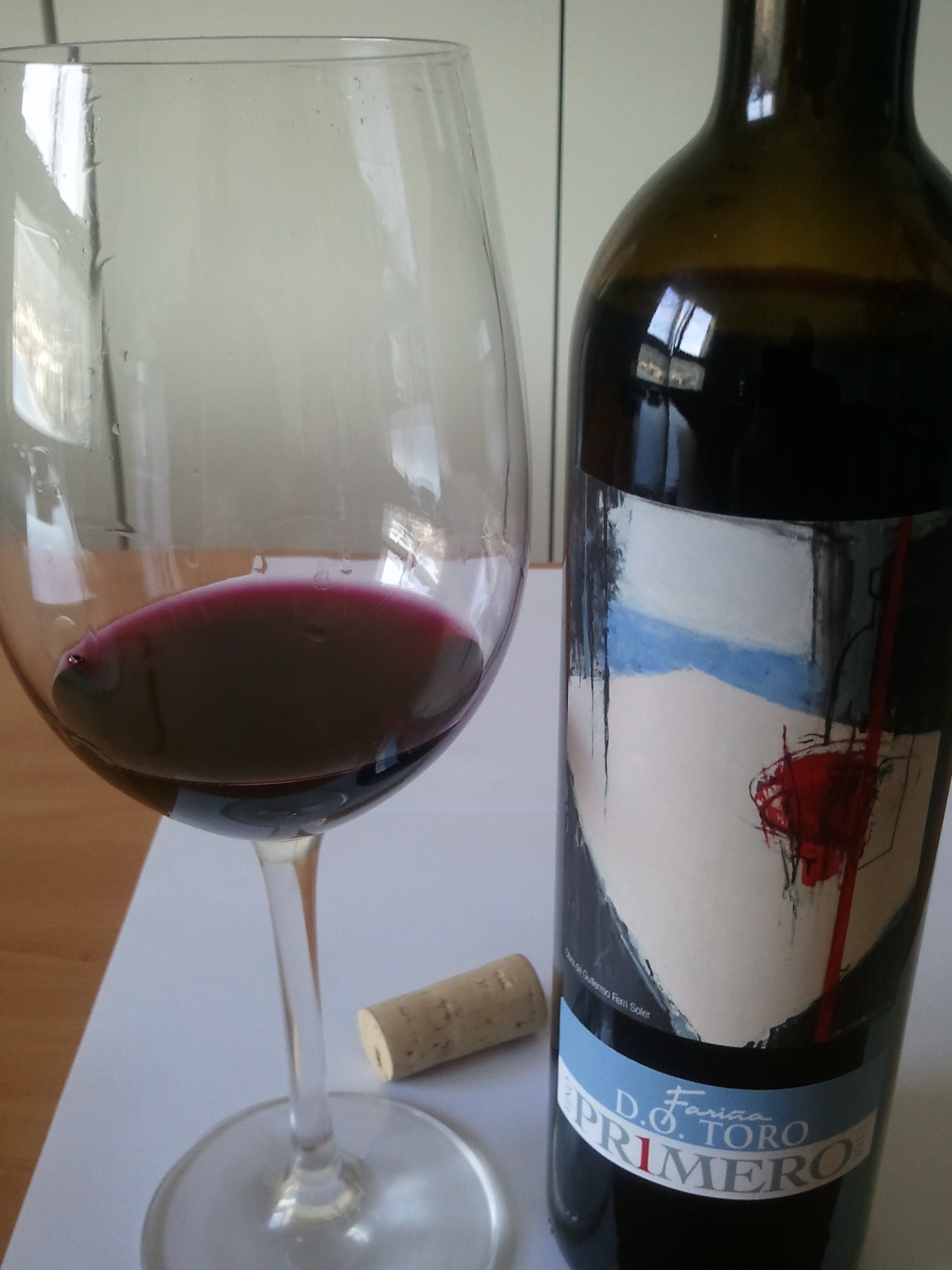 Toro primero 100% tinta de toro (variedad de tempranillo). Toro, Zamora, España.